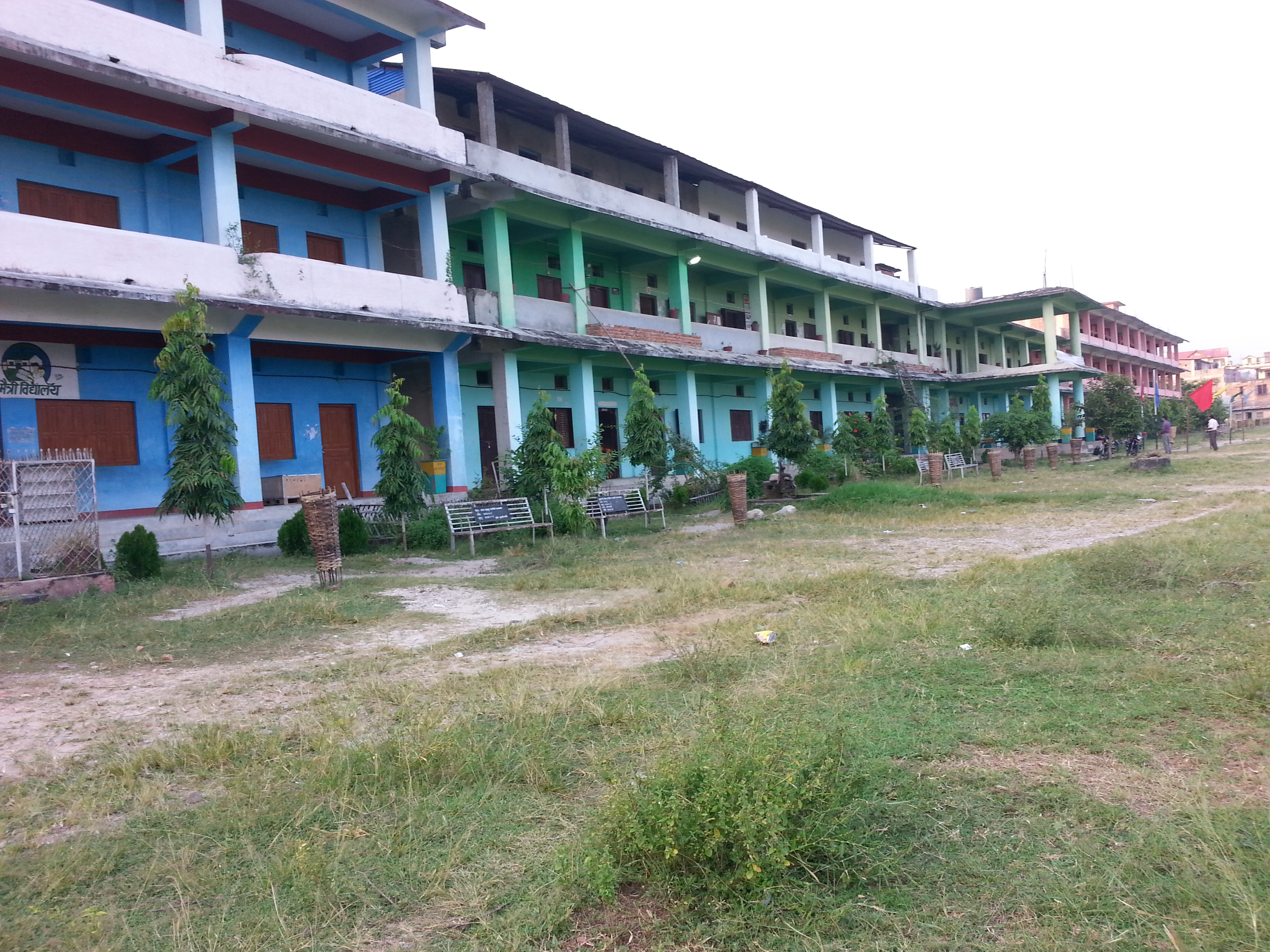 नेपाली: त्रियुगा माध्यमिक विद्यालय, गाईघाट